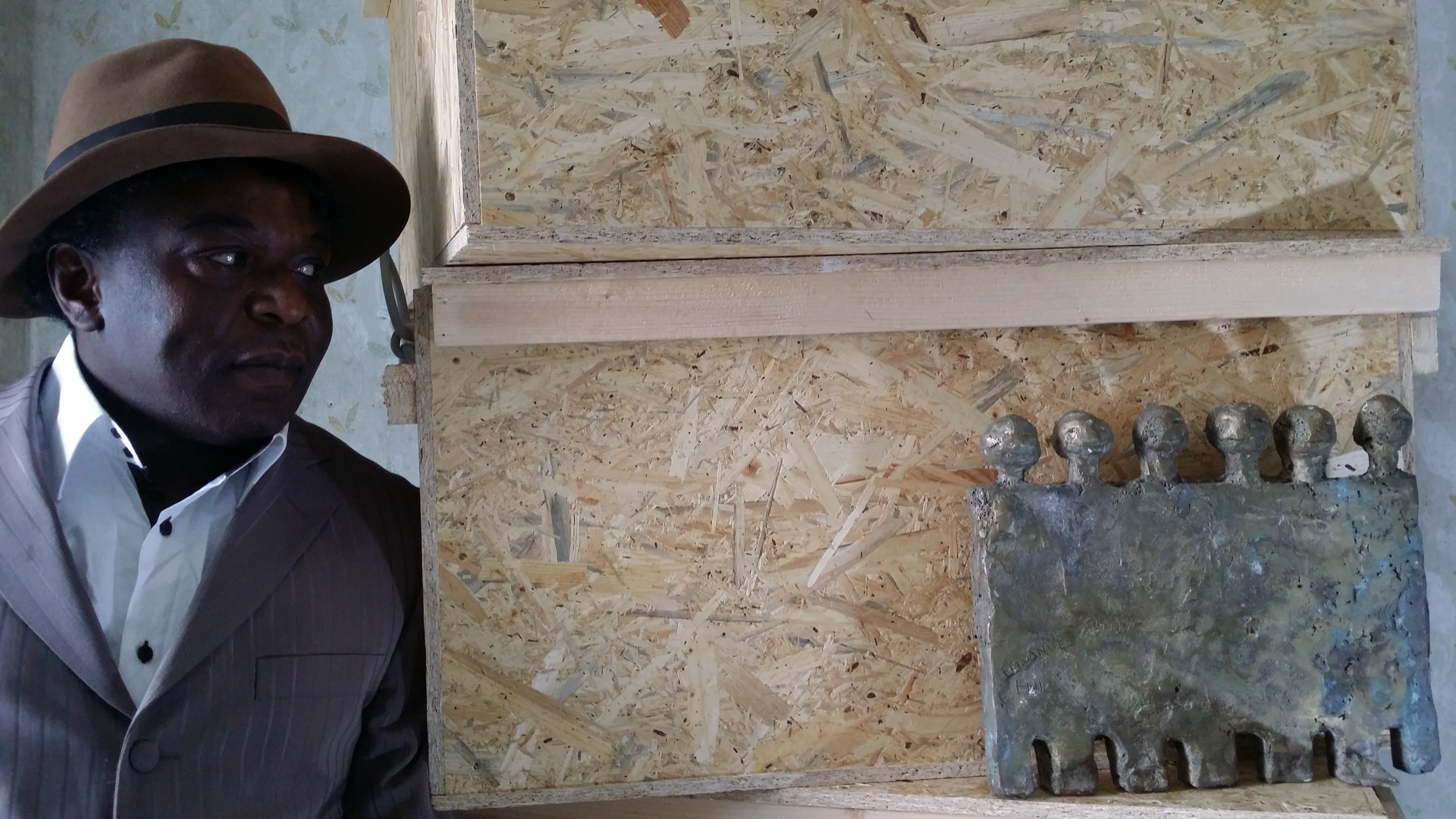 Emmanuel Eni